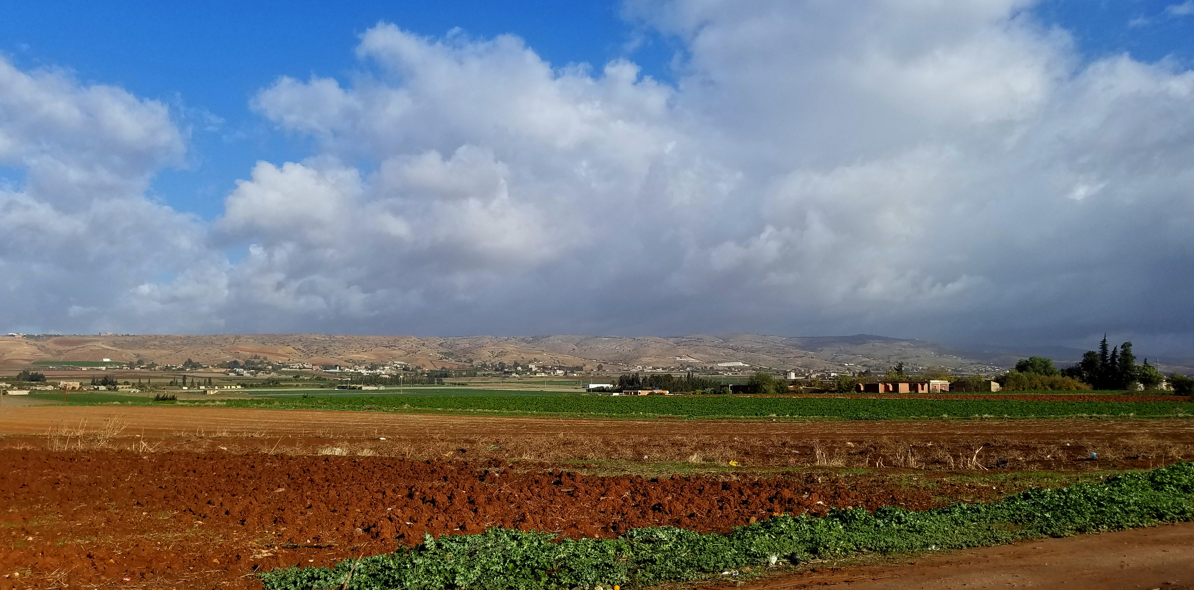 Terres agricoles à Bokâat El Mekhatria (Au nord de la ville de Chlef)